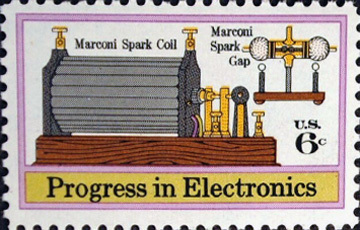 US commemorative stamp, 1973, 6 cent